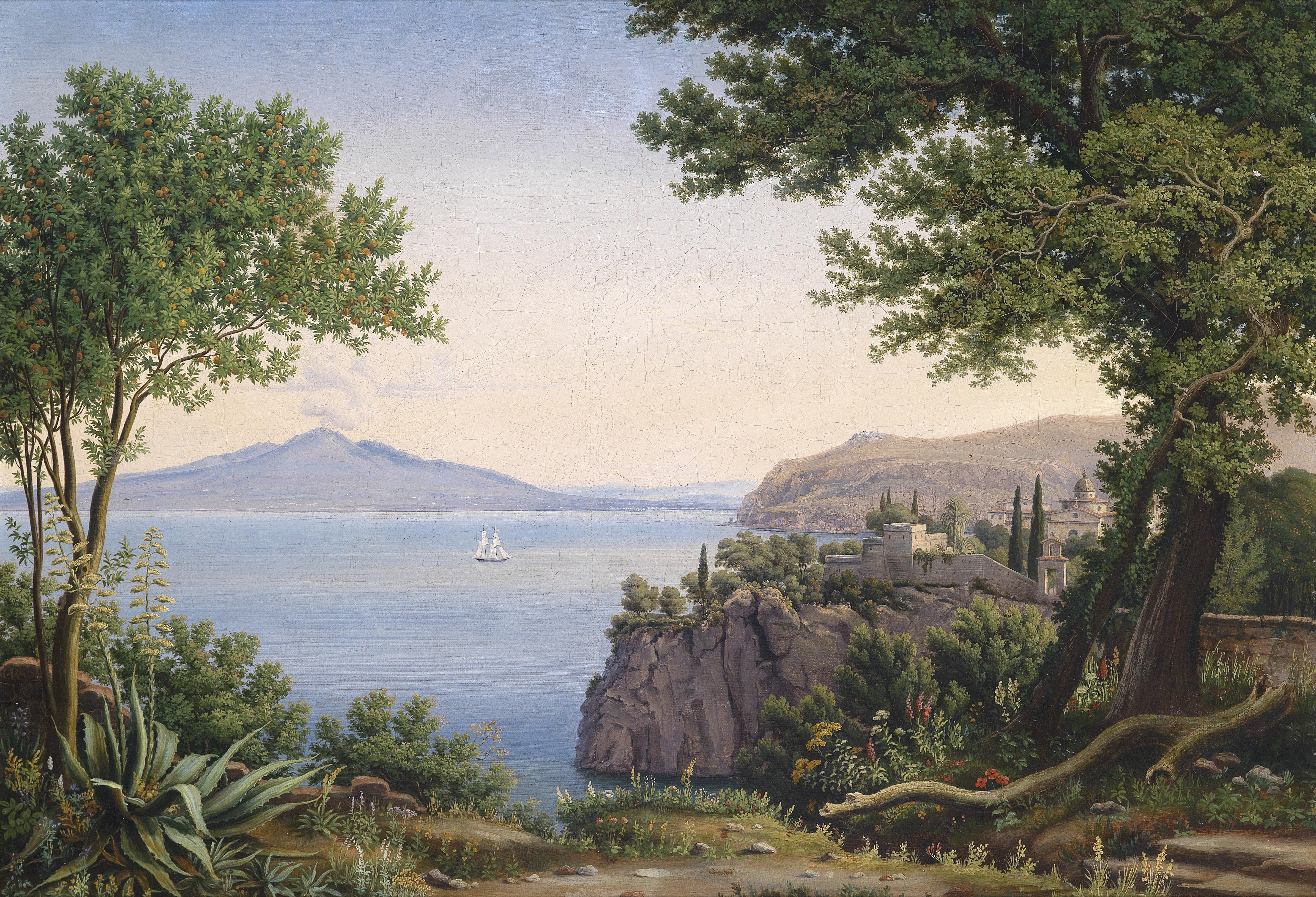 Blick auf den Vesuv (?), monogrammiert CR (ligiert), Öl auf Leinwand, 48 x 70 cm